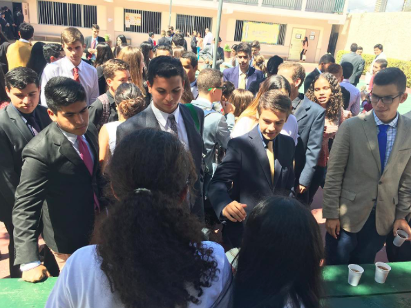 Modelo de Naciones Unidas de Arcoiris